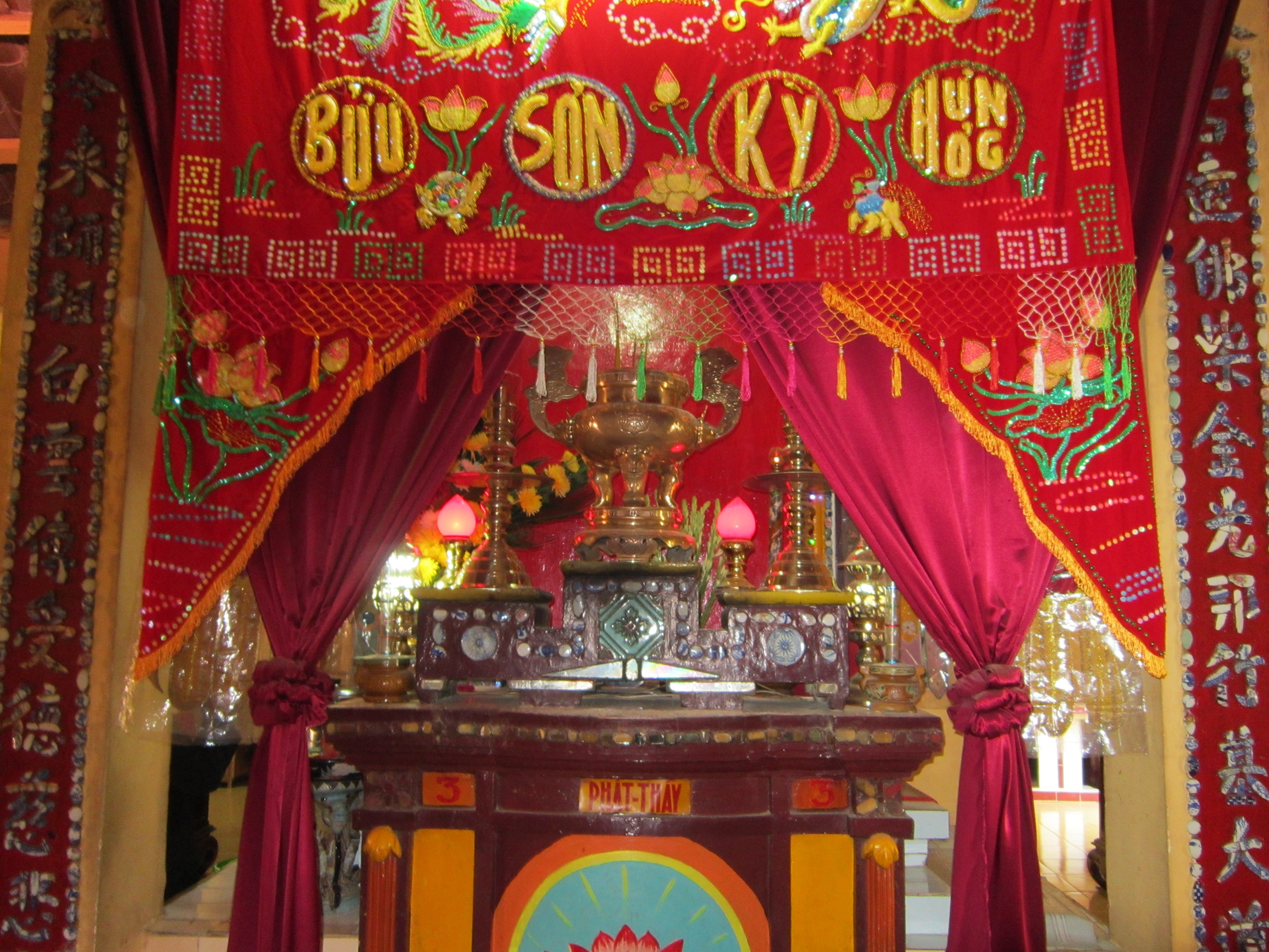 Bàn thờ Phật Thầy Tây An (Đoàn Minh Huyên) trong chùa Thới Sơn, thuộc xã Thới Sơn, huyện Tịnh Biên, An Giang, Việt Nam.